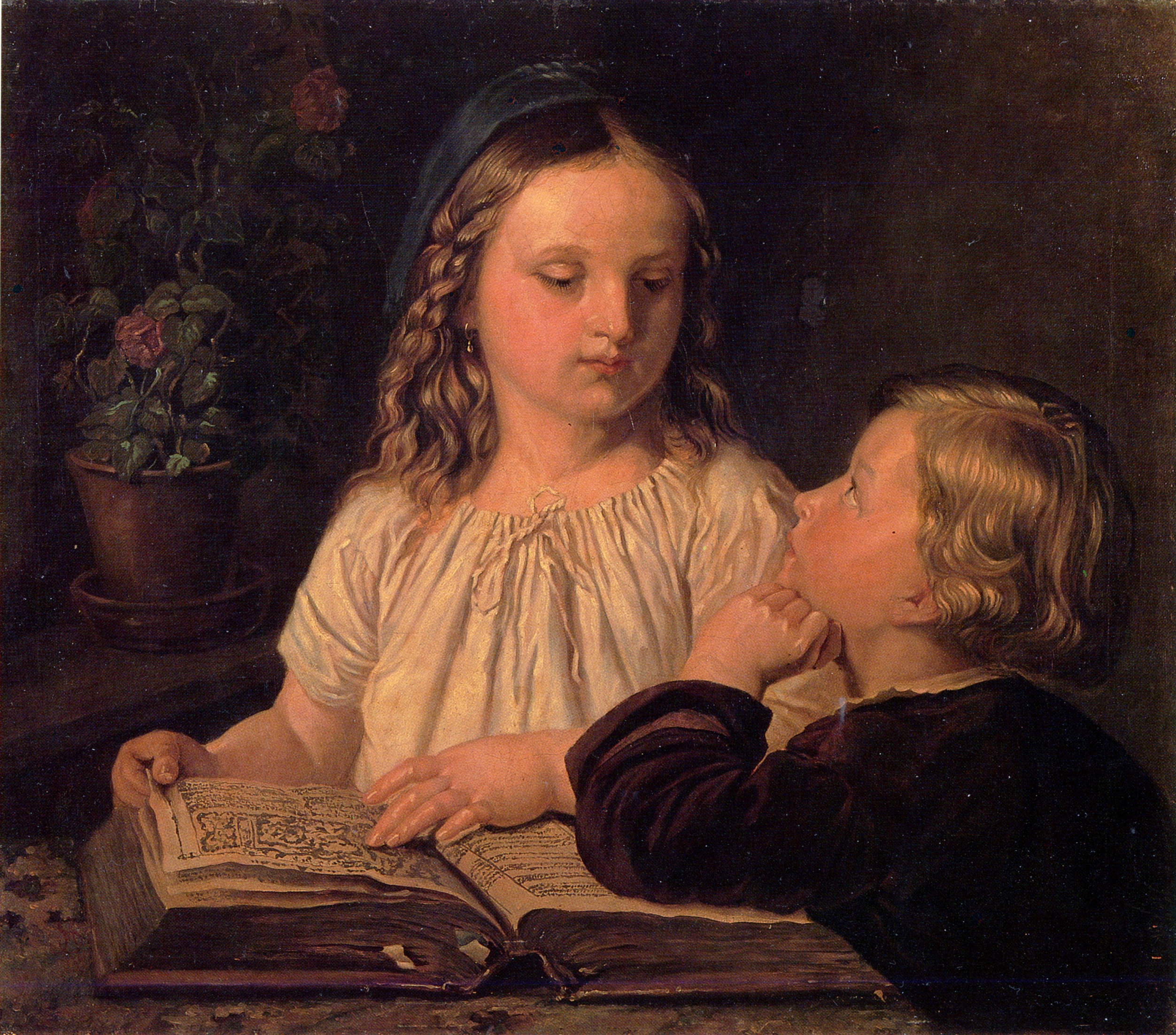 Portret dzieci pochylonych nad książką